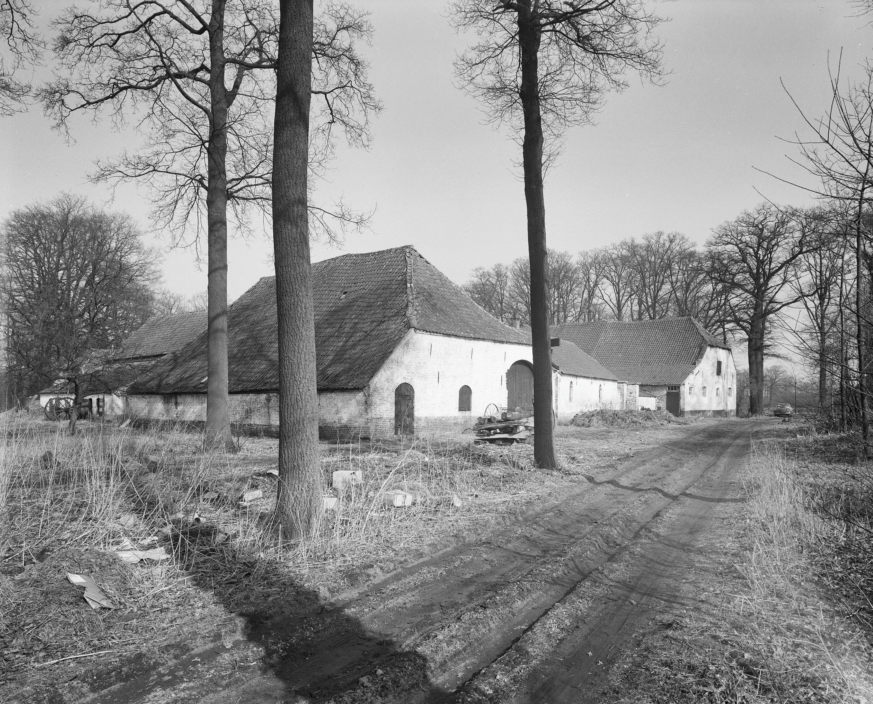 Hoeve Ossenbroek 71-72: overzicht